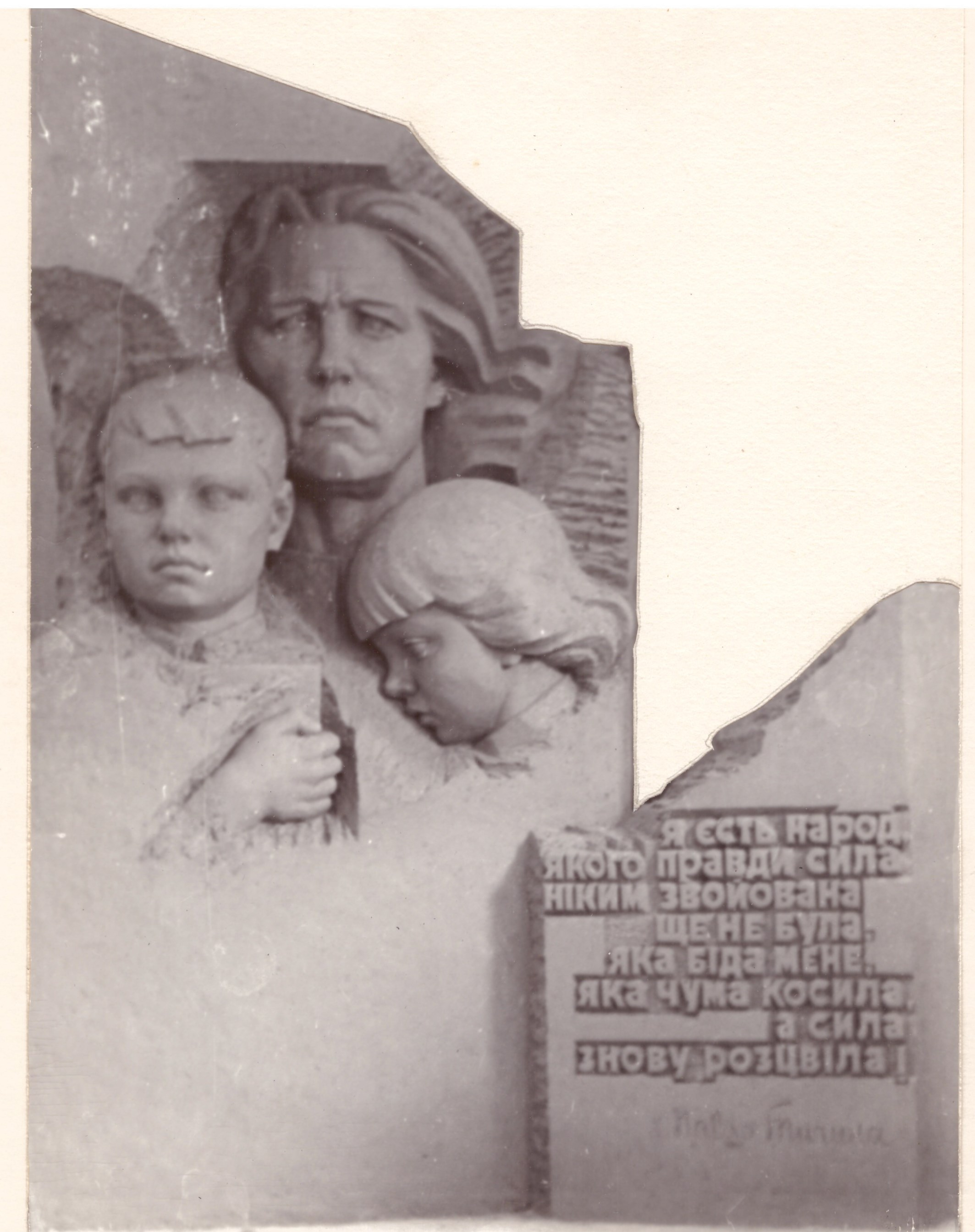 Пам’ятник селу Тхорин Овруцького району Житомирської області, спаленому в роки Великої Вітчизняної війни німецько-фашистськими загарбниками. 1978. Скульптор Таранченко В.О., архітектор Марчук М.Г. Горельєф. Литий бетон.